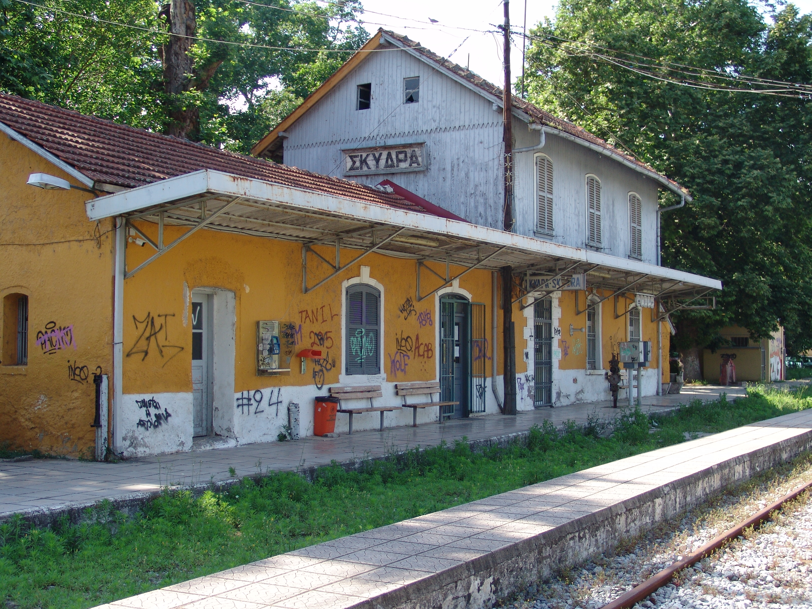 Παλιός σιδηροδρομικός σταθμός Σκύδρας«Παλιός σιδηροδρομικός σταθμός Σκύδρας»